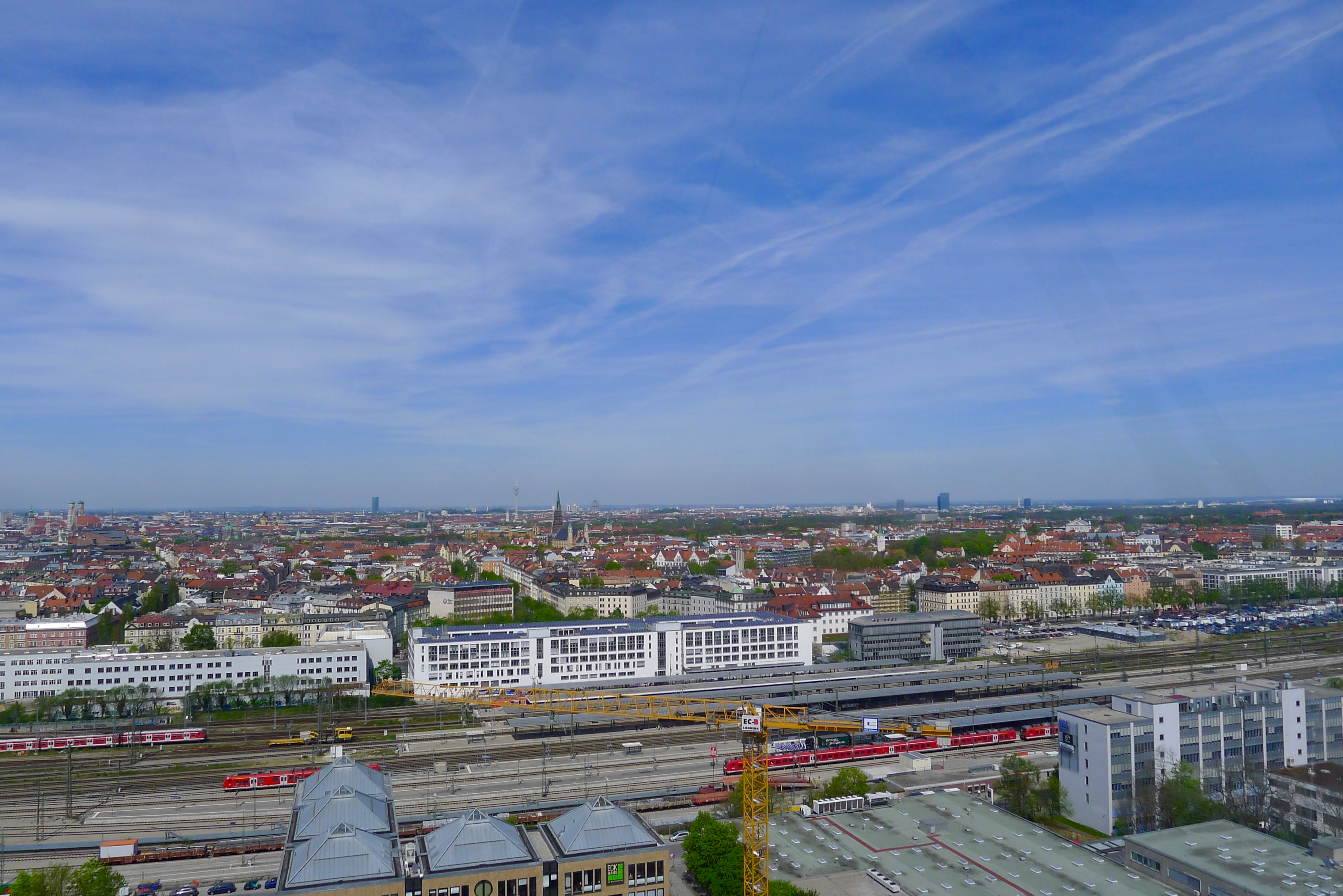 Blick von Osten auf den Ostbahnhof und Geleise vom temporären Riesenrad im Werksvertel aus.